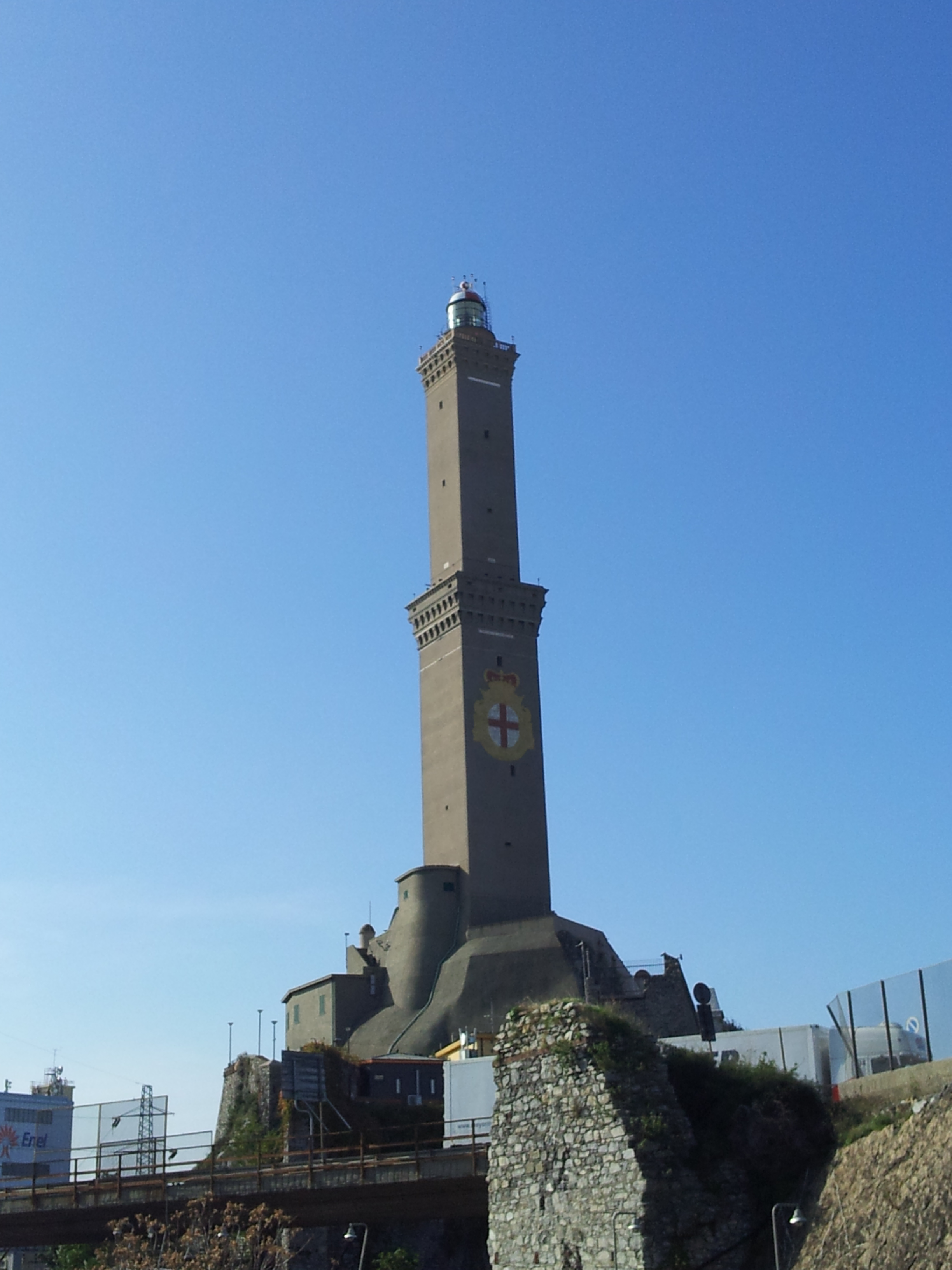 Torre della Lanterna This is a photo of a monument which is part of cultural heritage of Italy.